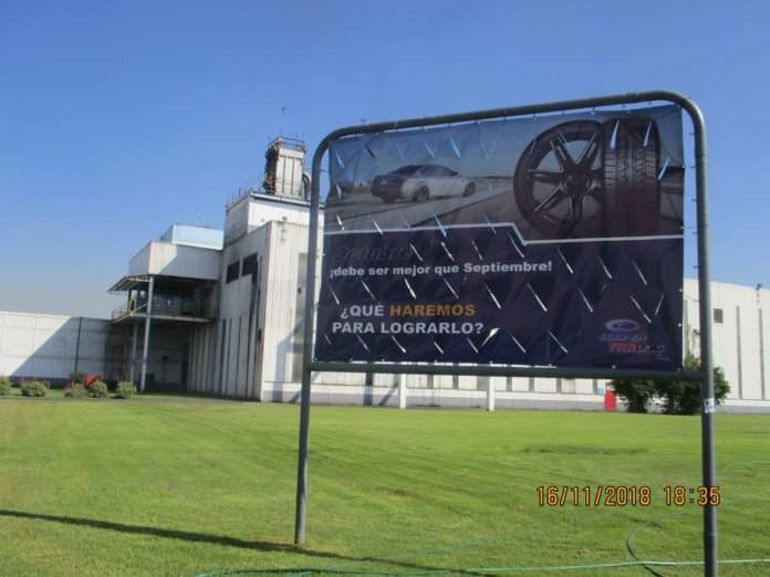 Εξωτερικός χώρος εργοστασίου